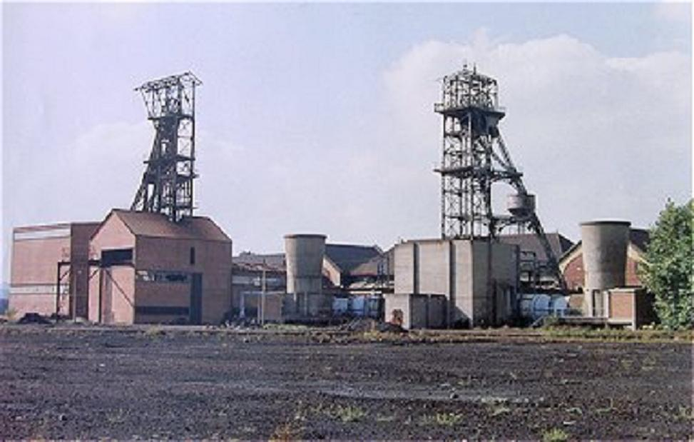 Fosse n° 8 et 8 bis à Évin-Malmaison , de la Compagnie des mines de Dourges